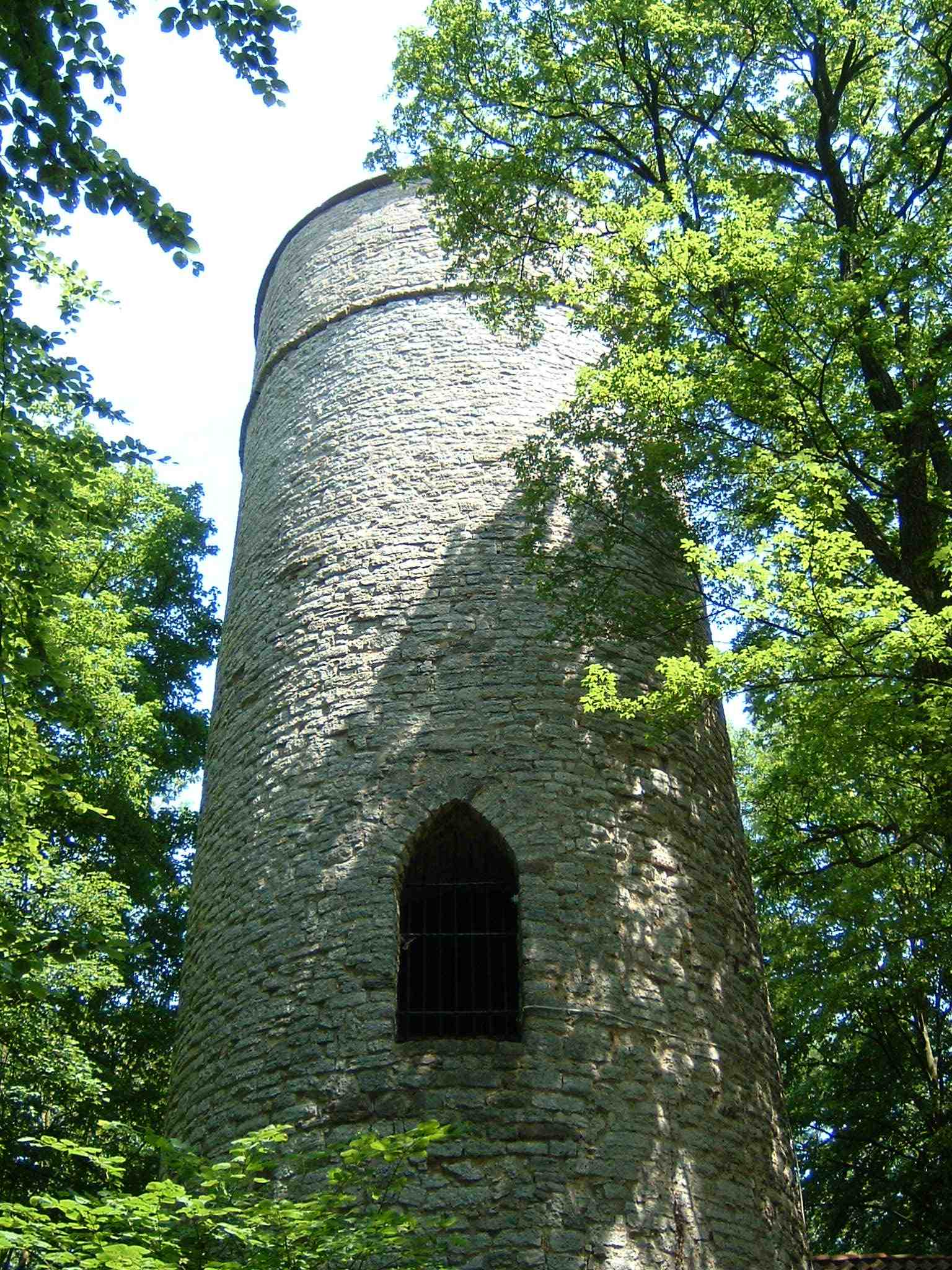 Grubenhagen Castle near Einbeck, Germany